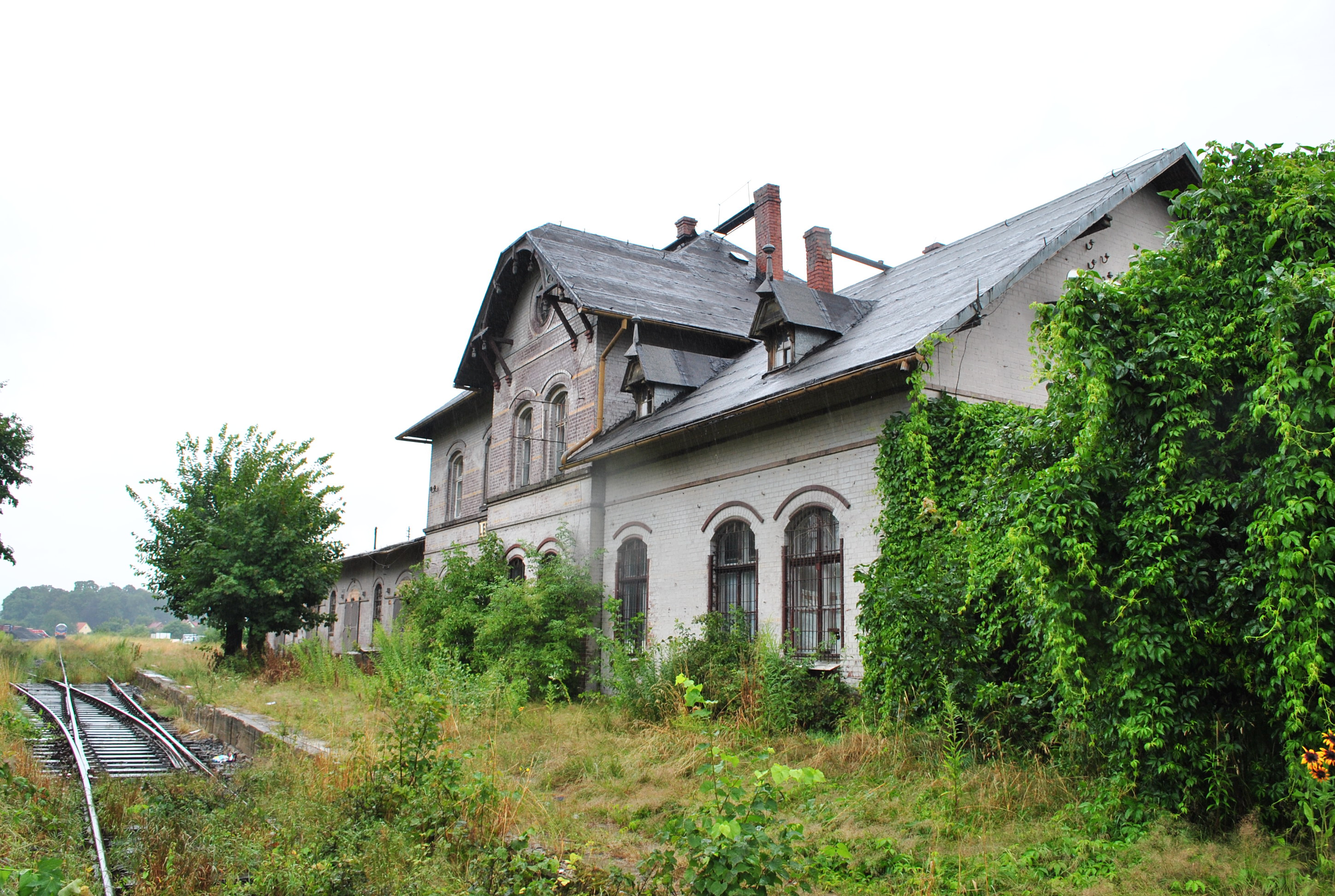 Budynek dworca na stacji Leśna